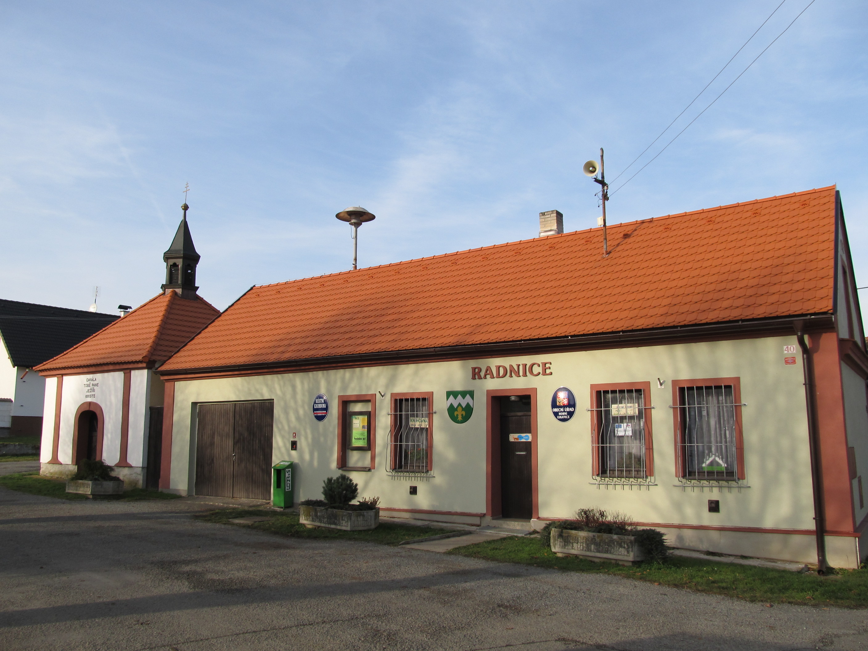 Horní Lukavice - radnice s kaplí